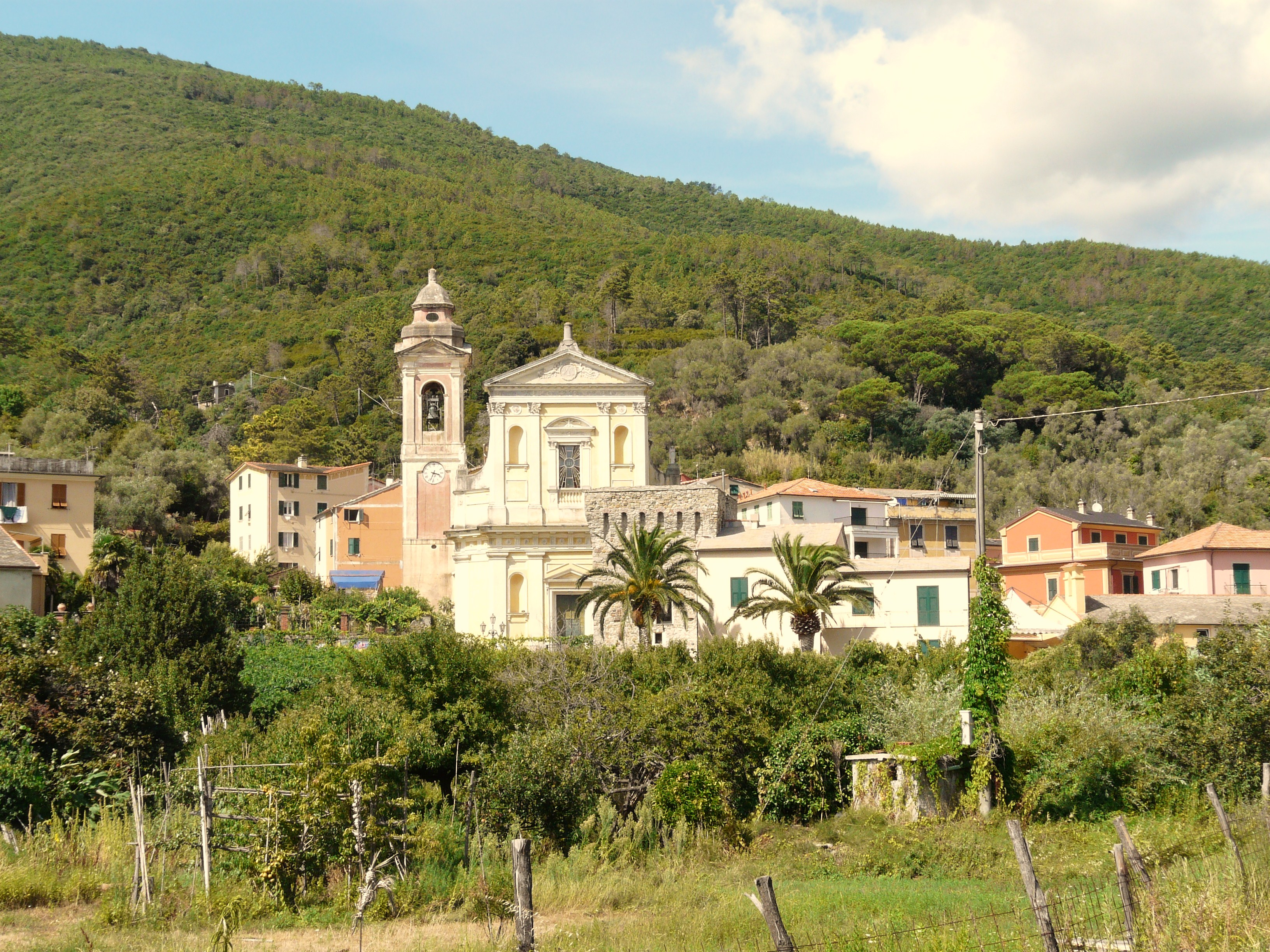 Panorama di Deiva Marina, Liguria, Italia